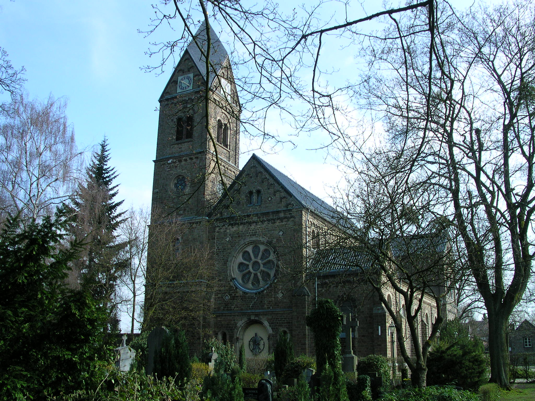 rk. Pfarrkirche St. Katharina in Aachen Forst, erbaut 1866 (Schiff) - 1890 (Turm), vom benachbarten Friedhof aus gesehen